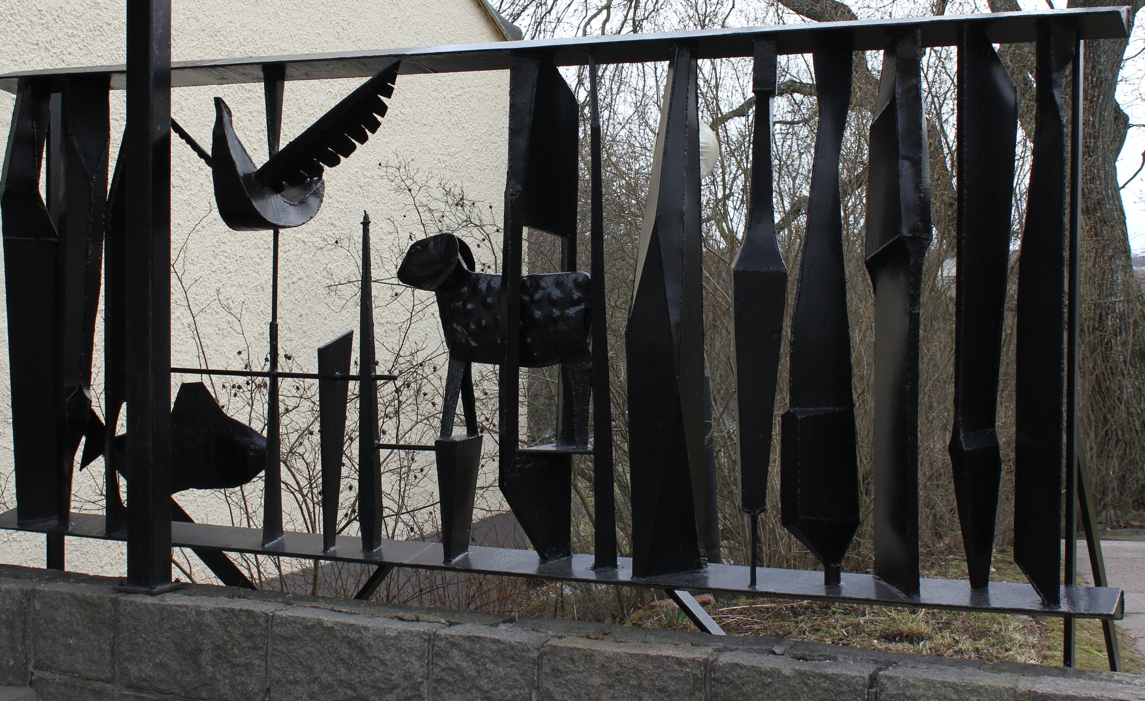 Utsmyckat räcke av Folke Heybroek vid ingången till Brännkyrka församlingshem i stadsdelen Örby slott, Stockholm.